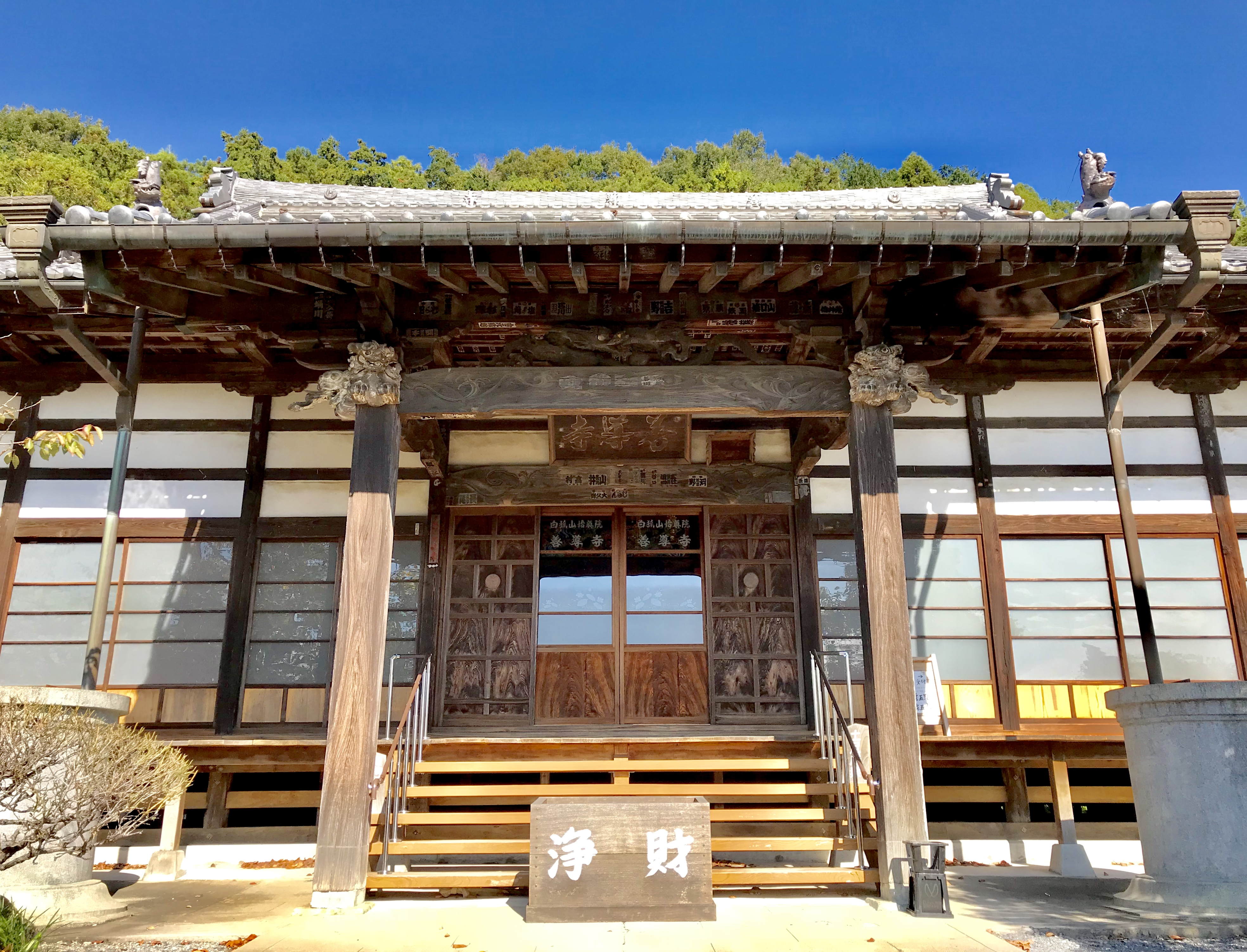 藤田善導寺の本堂を正面から撮影